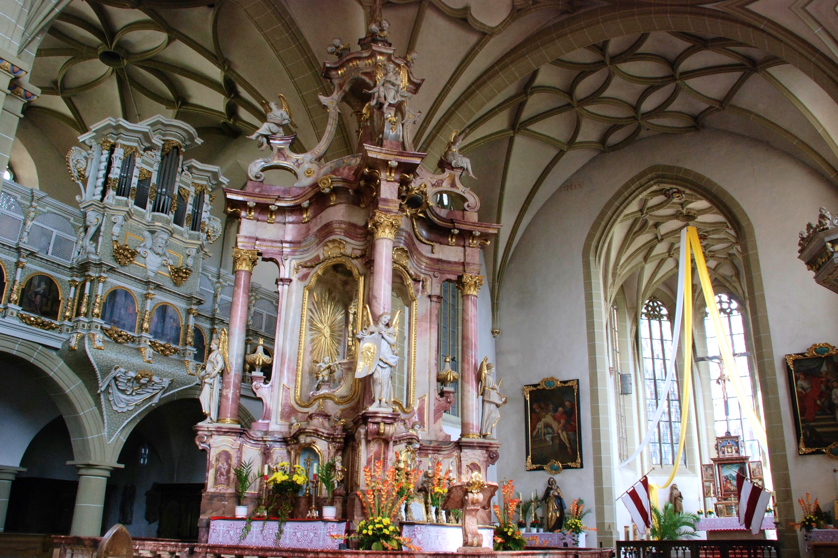 Innenansicht der Wallfahrtskirche 'Maria im Sand' in DettelbachInterior view of the Pilgrimage church 'Maria im Sand' in Dettelbach